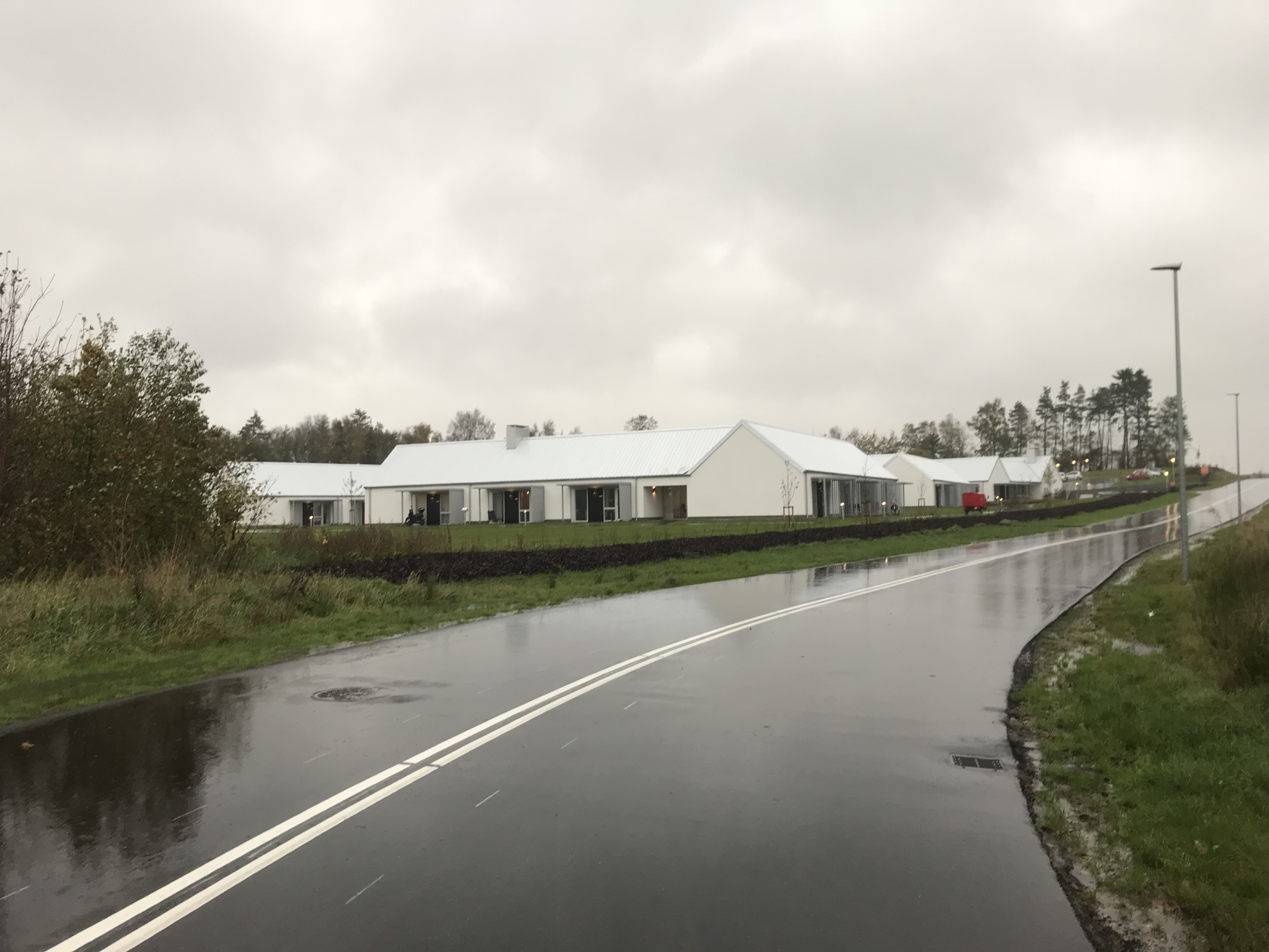 Det nye Bosted på Molhøj i Hadsund, Danmark.